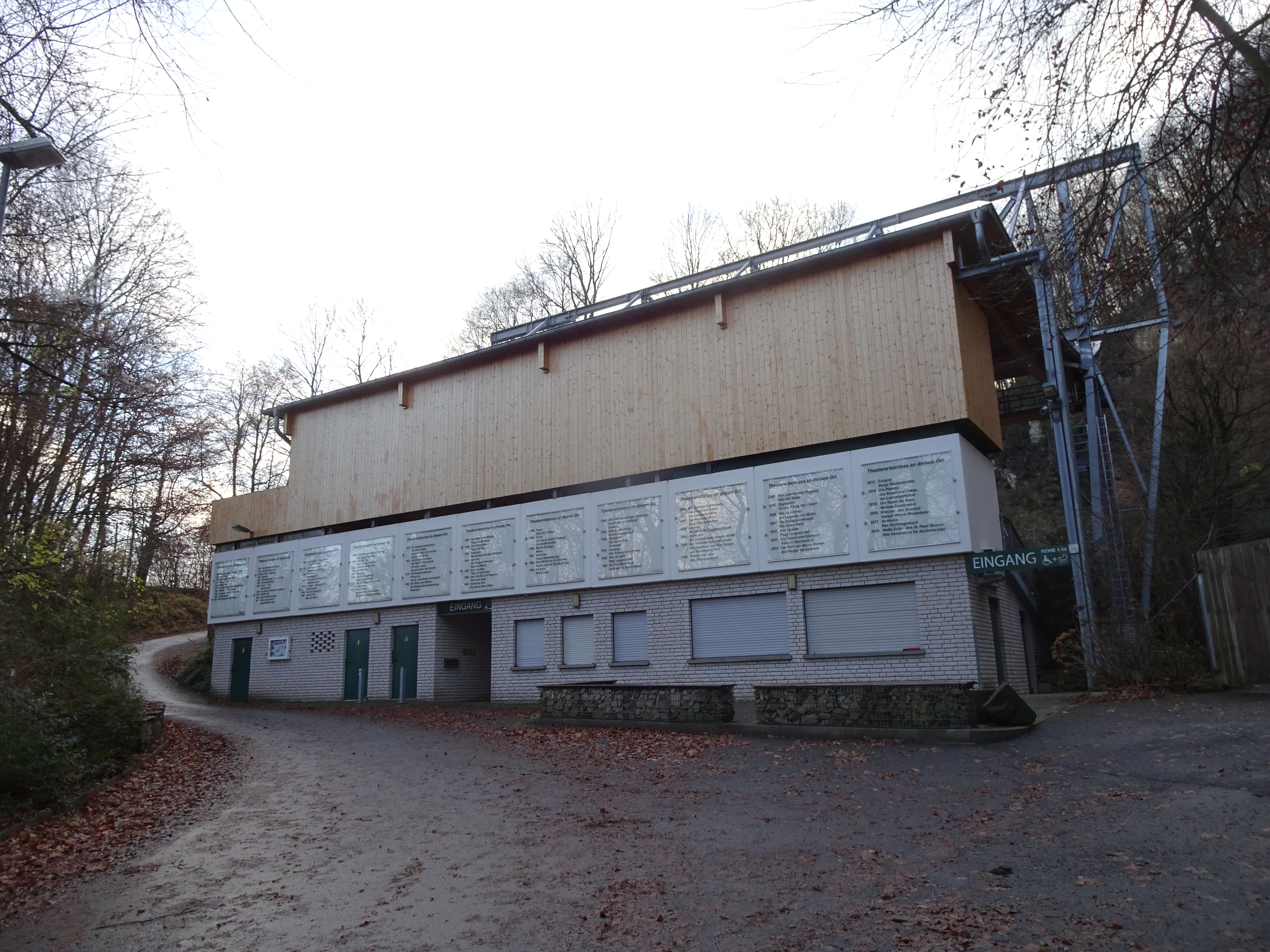 Freilichtbühne Porta, Eingangsbereich 2019